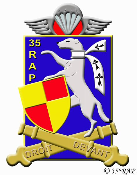 insigne régimentaire du 35e régiment d'artillerie parachutistes